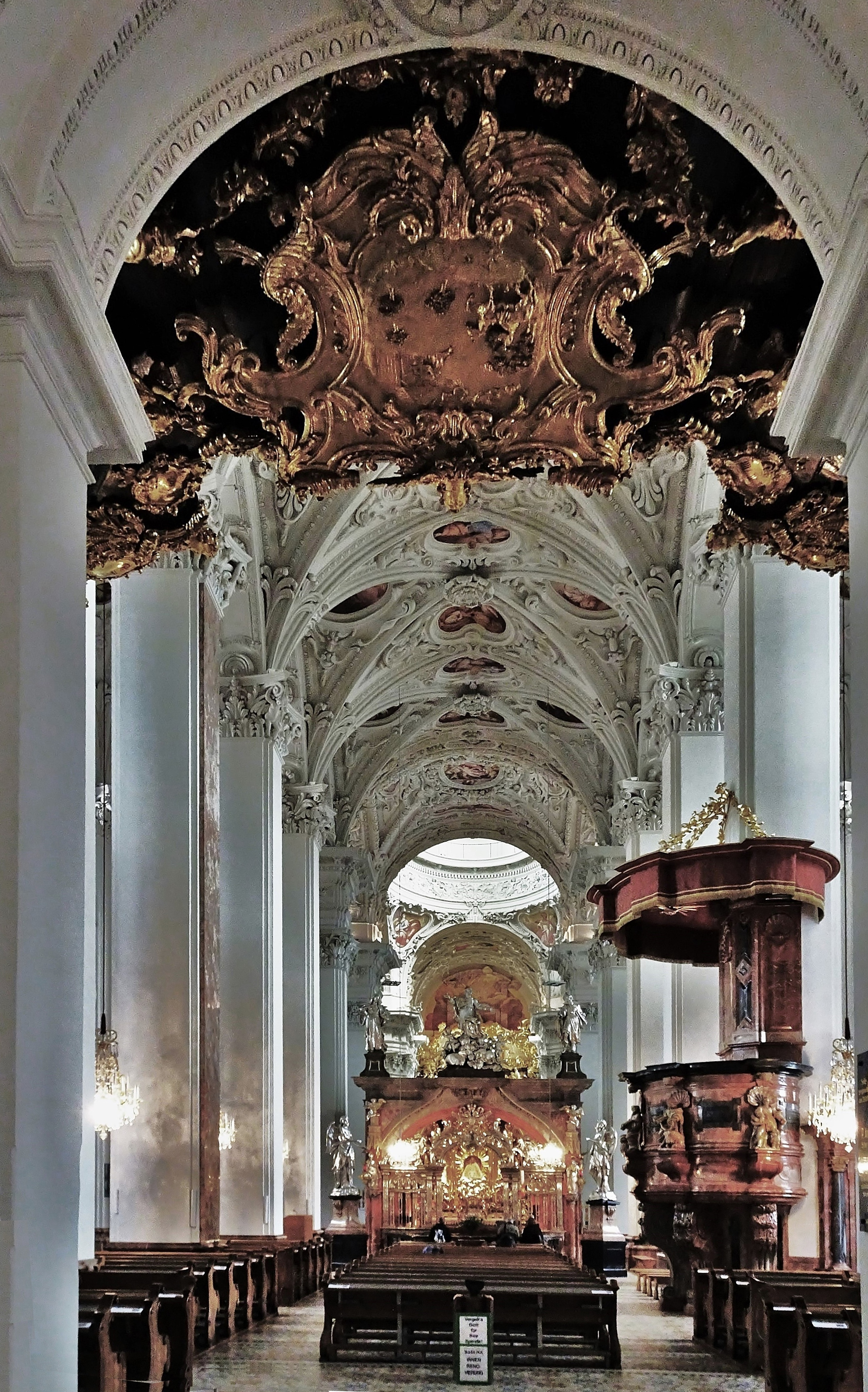 Basilica Minor, Pfarr- und Wallfahrtskirche Maria Geburt Mariazell, Innenansicht vom Westportal gegen die Gnadenkapelle